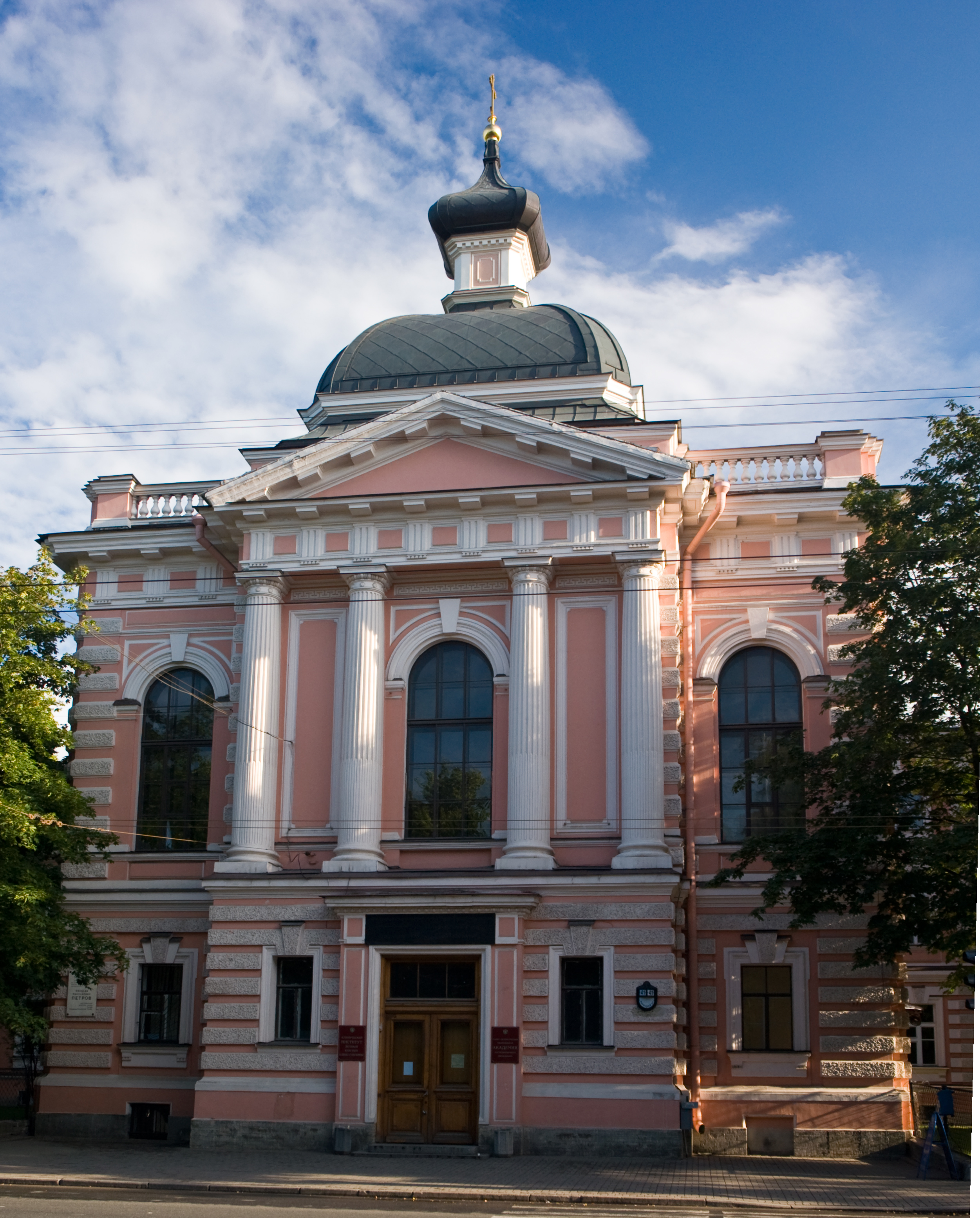 ул. Кирочная, д. 41 (Санкт-Петербург, Россия). Здание ГОУ ДПО "Санкт-Петербургская медицинская академия последипломного образования Федерального агентства по здравоохранению и социальному развитию".